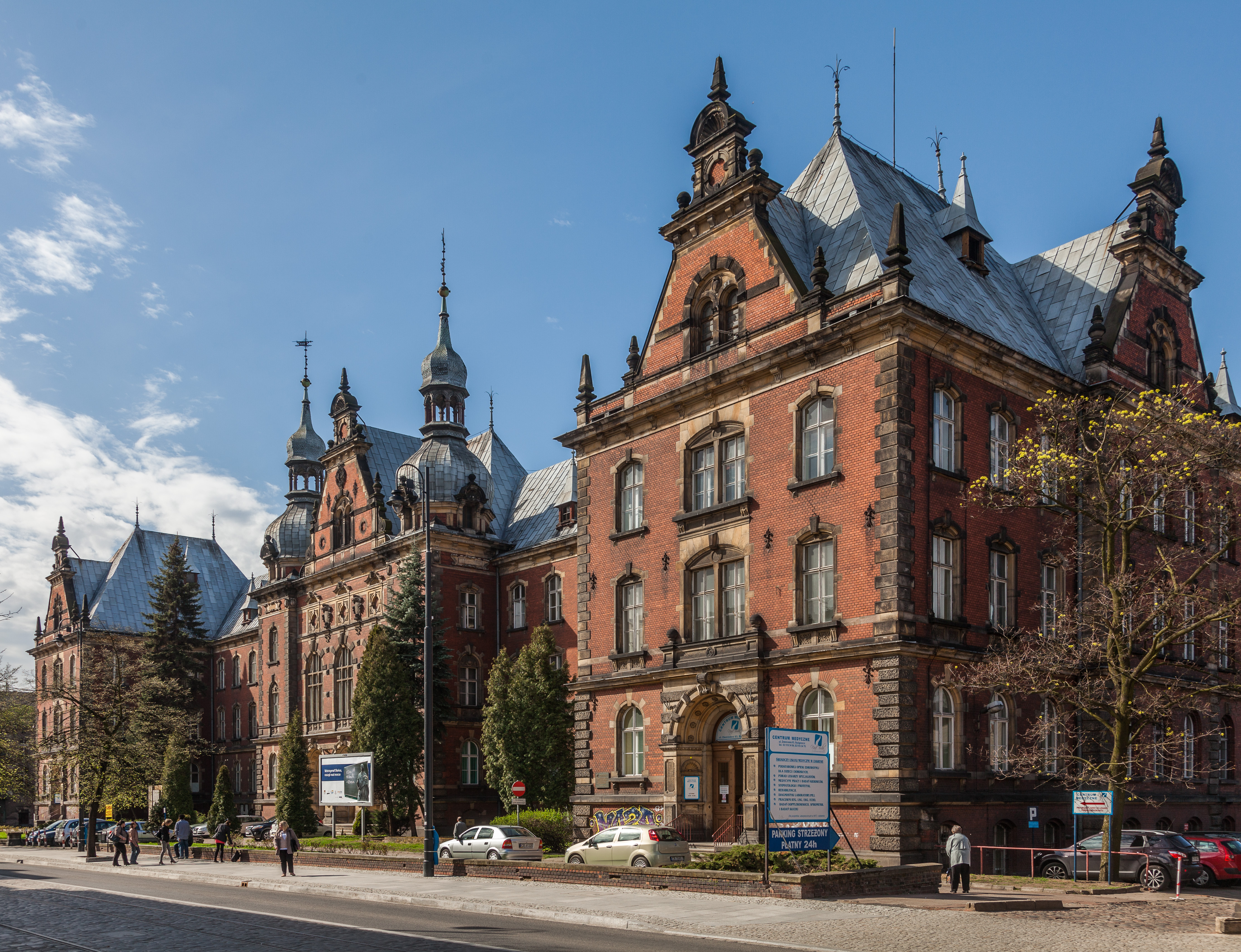 Budynek dawnej Kolei Wschodniej w Bydgoszczy, ul. Dworcowa 63.